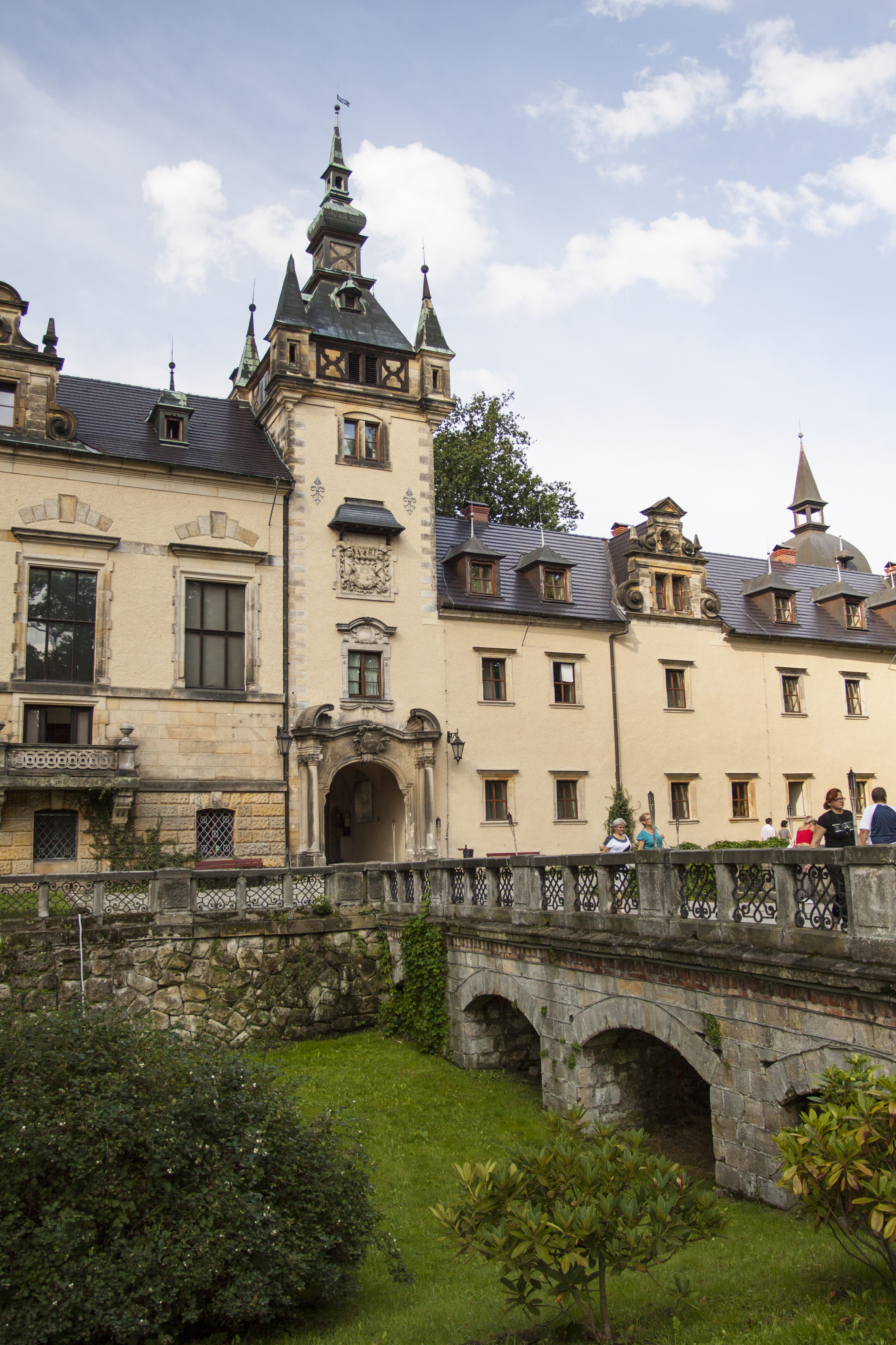 Kliczków 8 - zamek